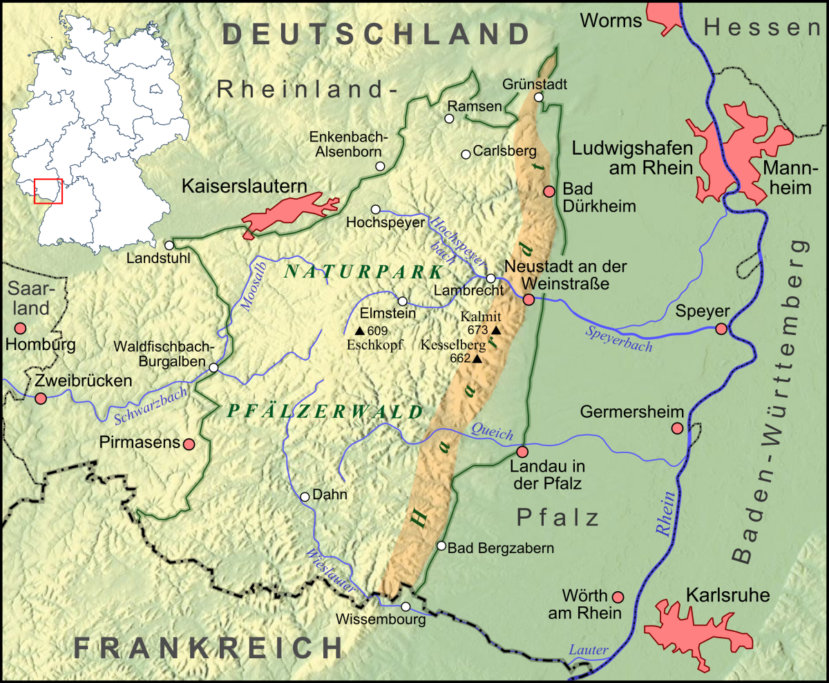 Lage der Haardt am Rande des Pfälzerwaldes